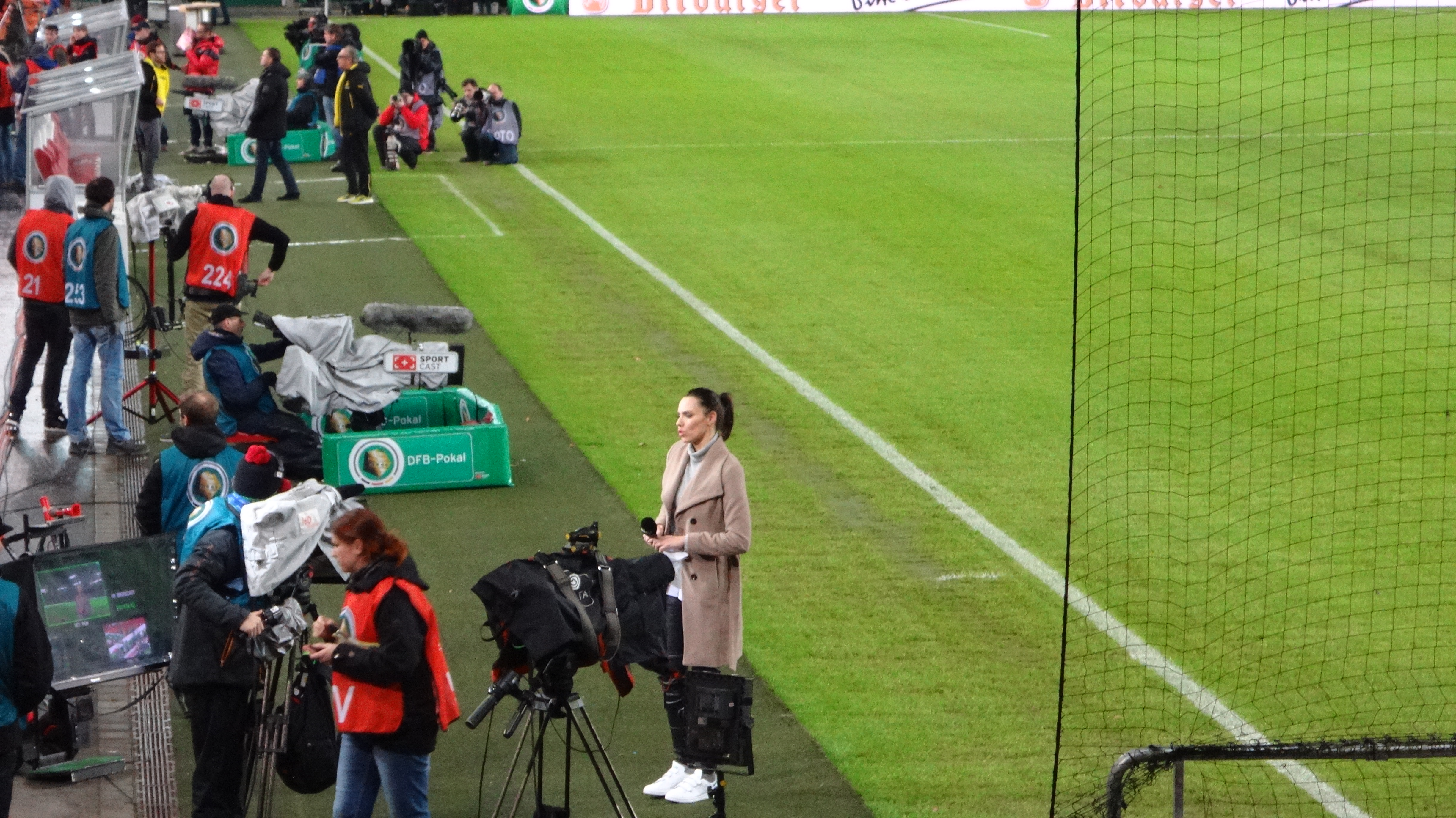 Viertelfinale in der MERCEDES BENZ ARENA Stuttgart. Endstand: 1:3.